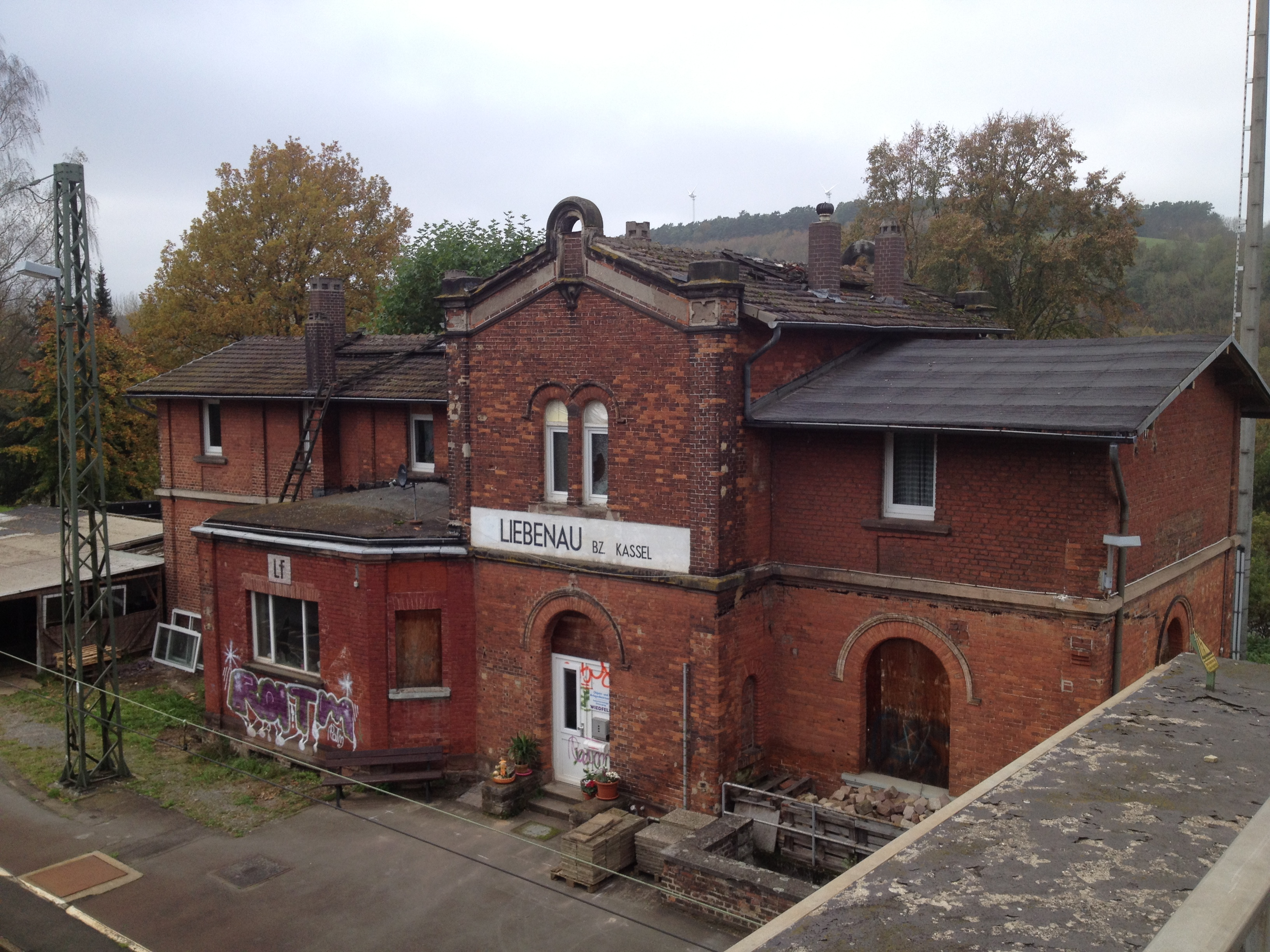 Das Bahnhofsgebäude des Bahnhofes Liebenau (Hessen) im Diemeltal. In den nächsten Jahren soll der Bahnhof aufgelassen werden, sodass es zwischen Hümme und Warburg keinen Unterwegshalt mehr gibt.